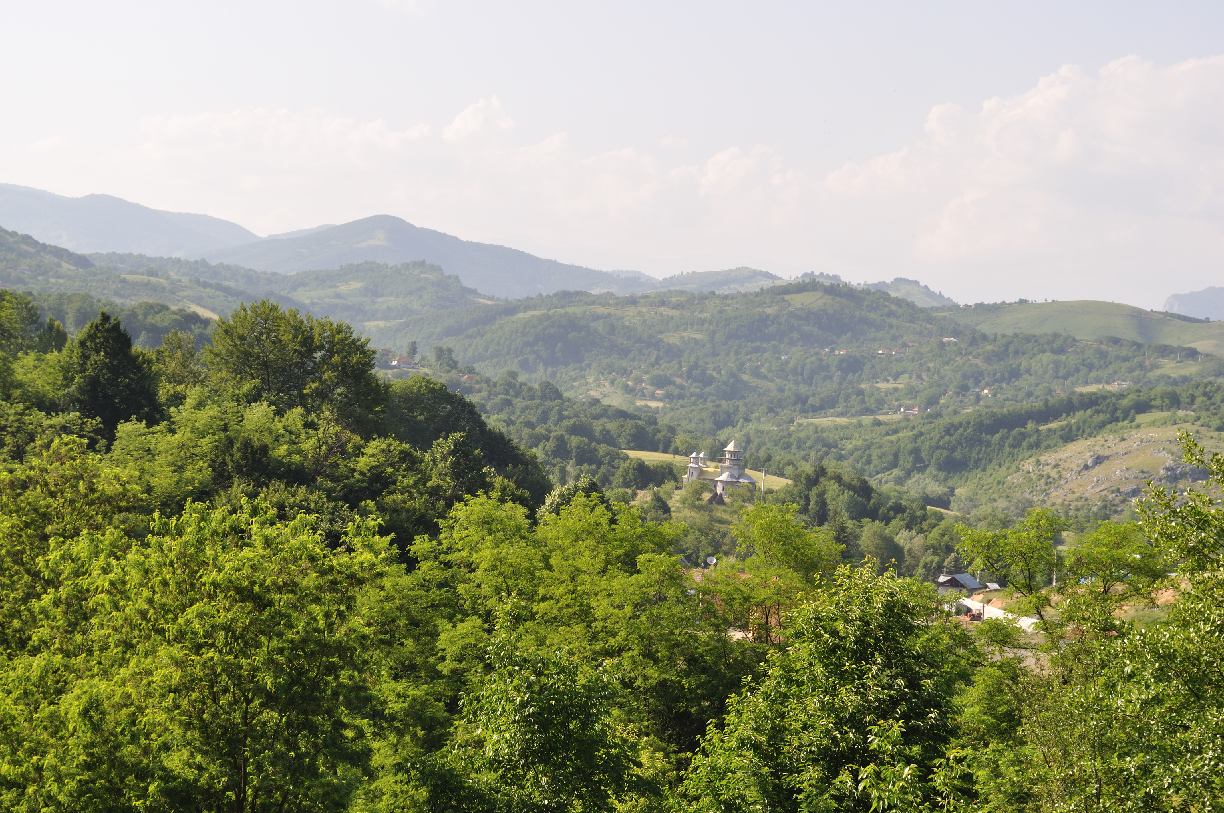 Ponoarele, județul Mehedinți